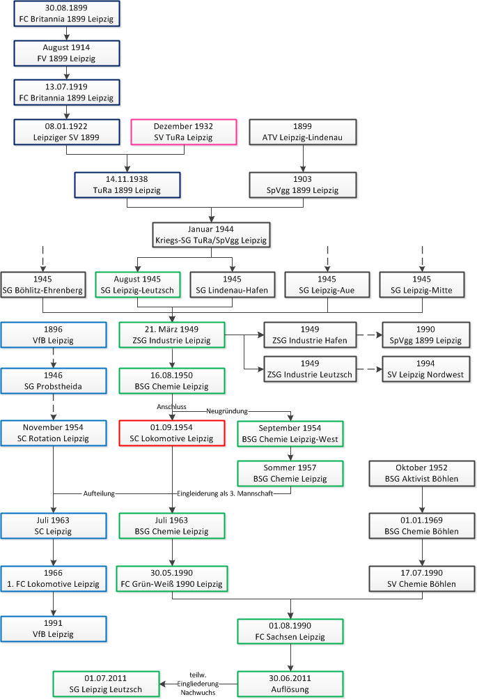 grafische Darstellung der Namens- und Vereinshistorie des FC Sachsen Leipzig (Daten von